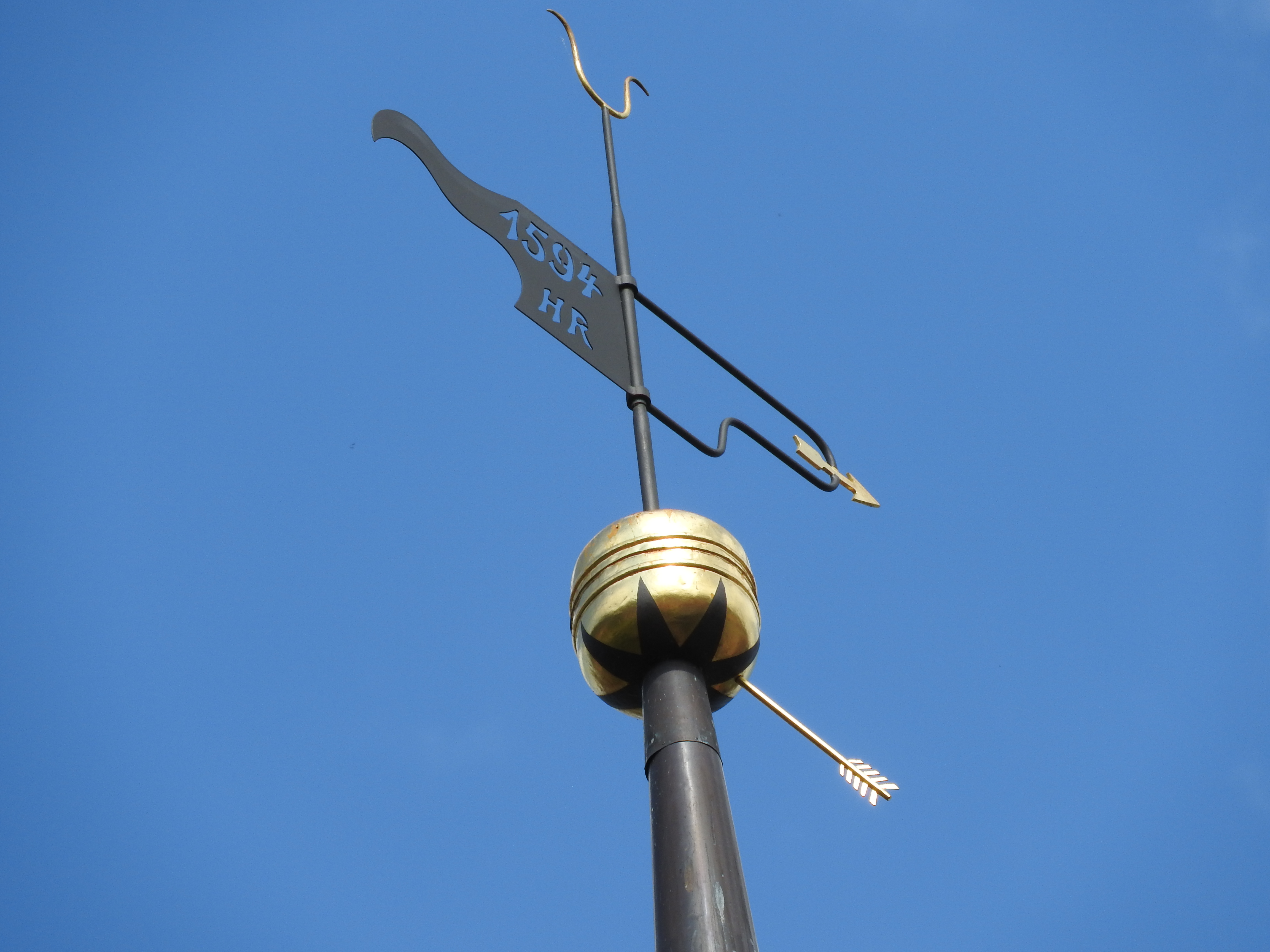 Wetterfahne mit Pfeil auf der Kirche in Schwarza, Rudolstadt, Thüringen